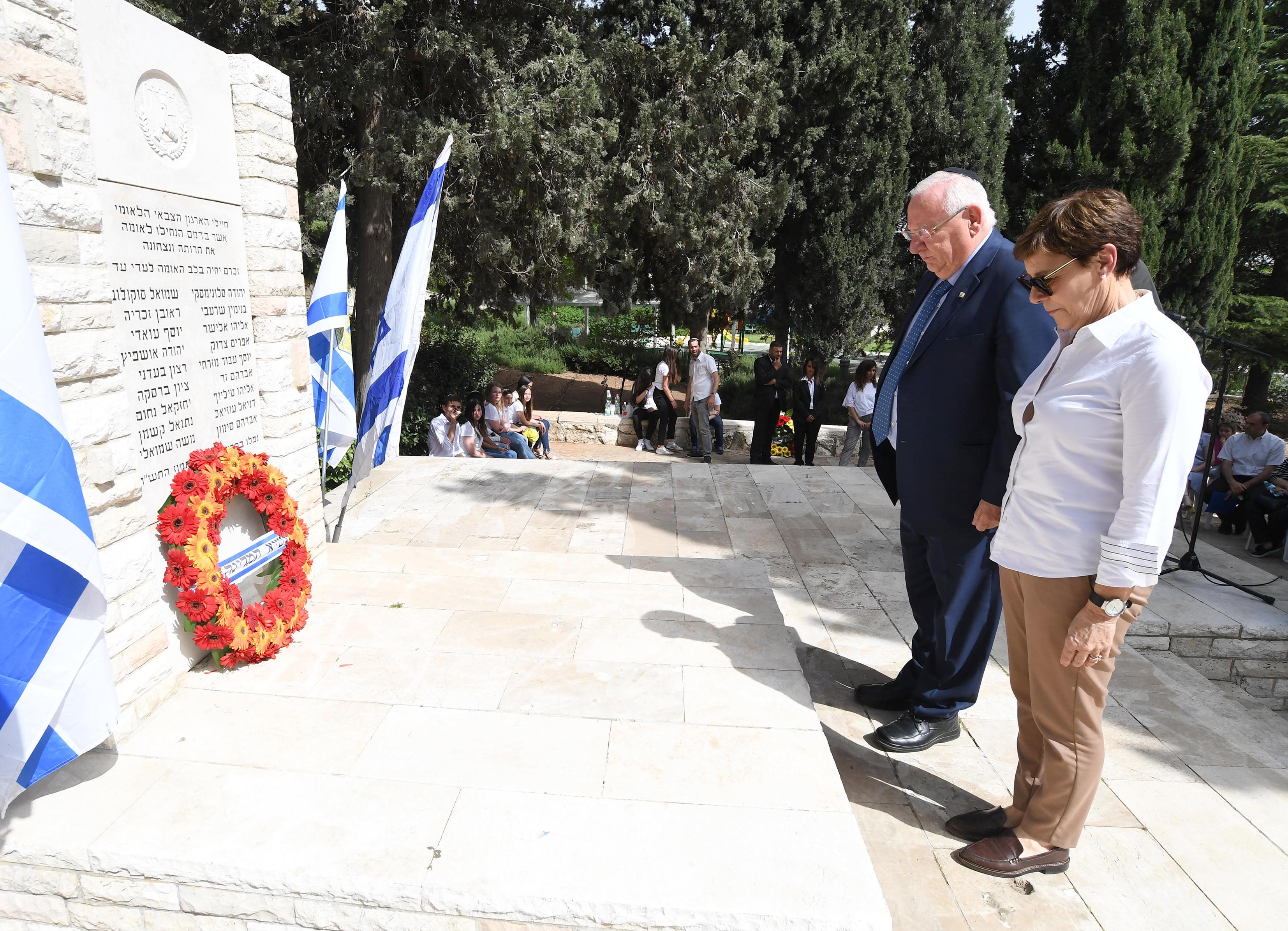 ראובן ריבלין נשיא מדינת ישראל בטקס האזכרה ללוחמי האצ"ל שנפלו בקרב על הכפר "מלחה" בירושלים בתמונה: ומזכירת הכנסת ירדנה מלר- הורוביץ